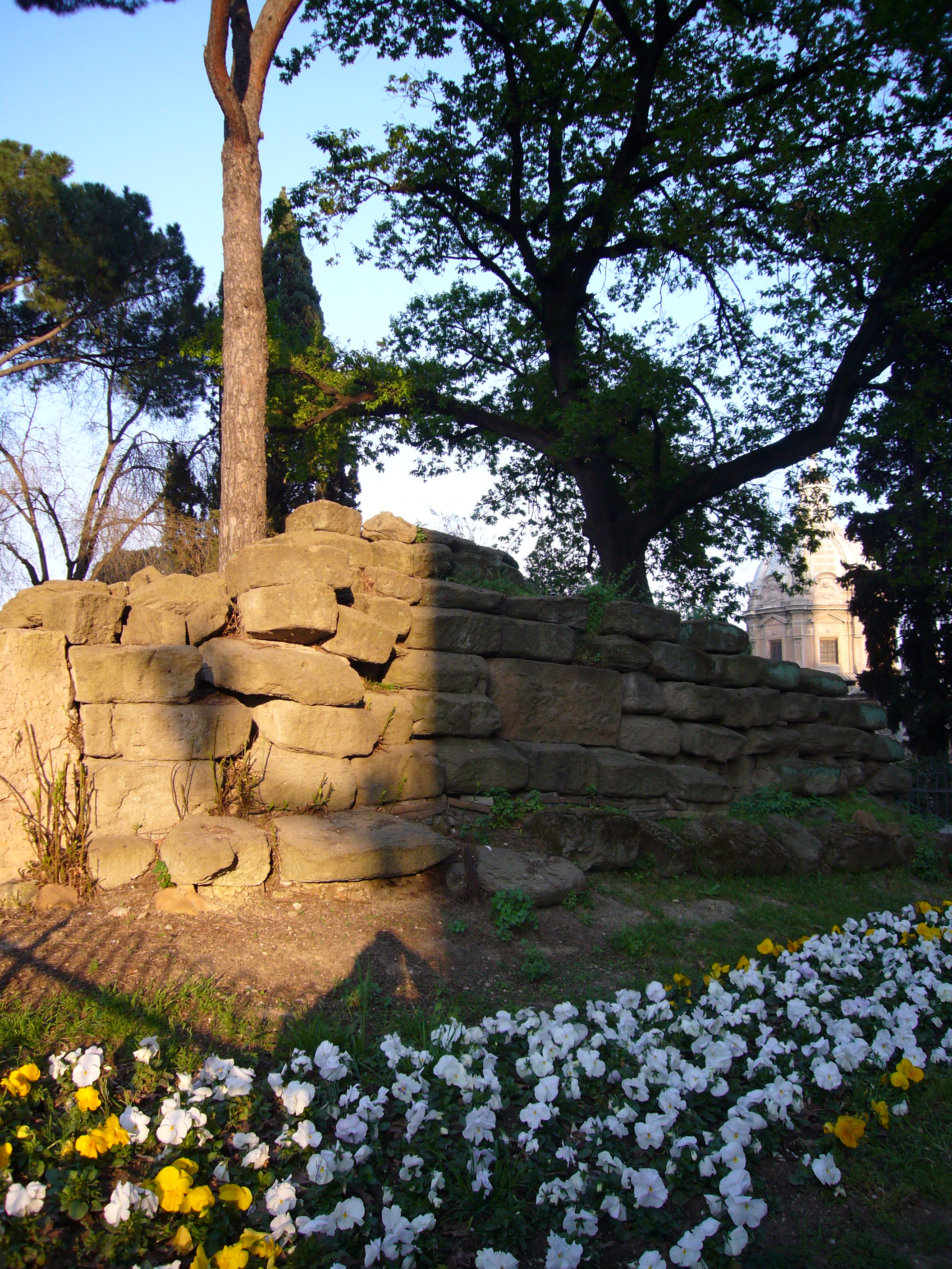 Roma, Campidoglio, via di S. Pietro in Carcere. Filare di tufi riconducibile (forse) al tempio di Giunone Moneta o all'Auguraculum.